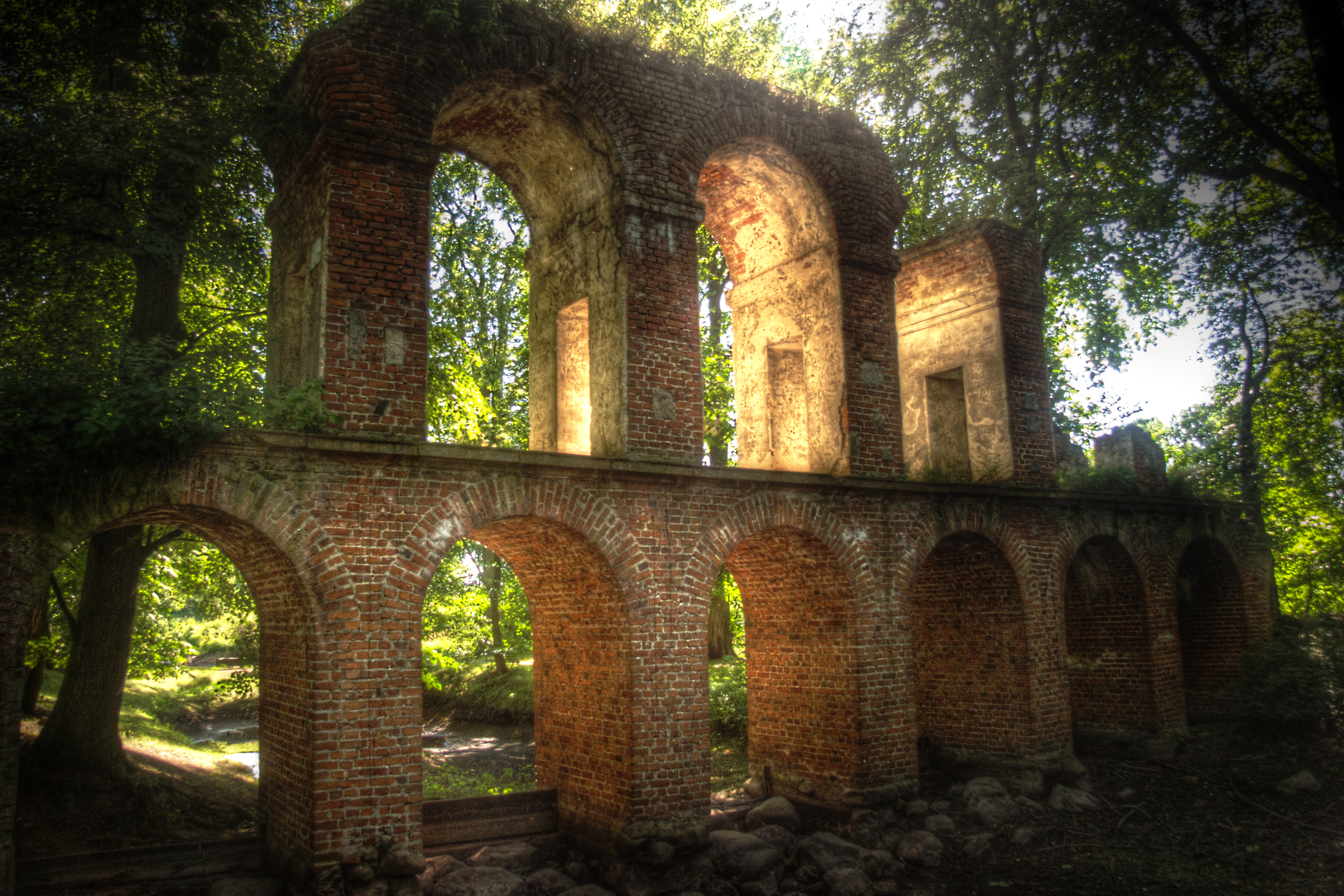 Arkadia, akwedukt, 1778